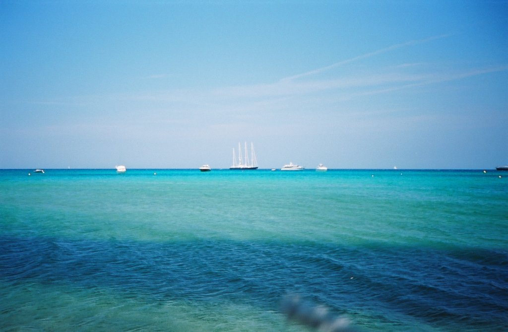 Phocea au large des plages de pampelonne de Saint Tropez